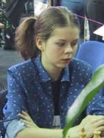 Tatiana Kosintseva